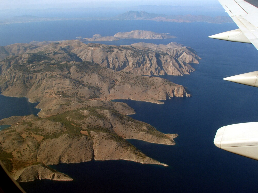 Symi island viewed from Boeing 737-400.